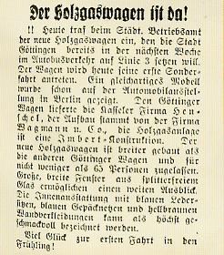 Goettinger Nachrichten vom 18.5.1935 Die Zeitungsmeldung zum Eintreffen des ersten Holzgasbusses